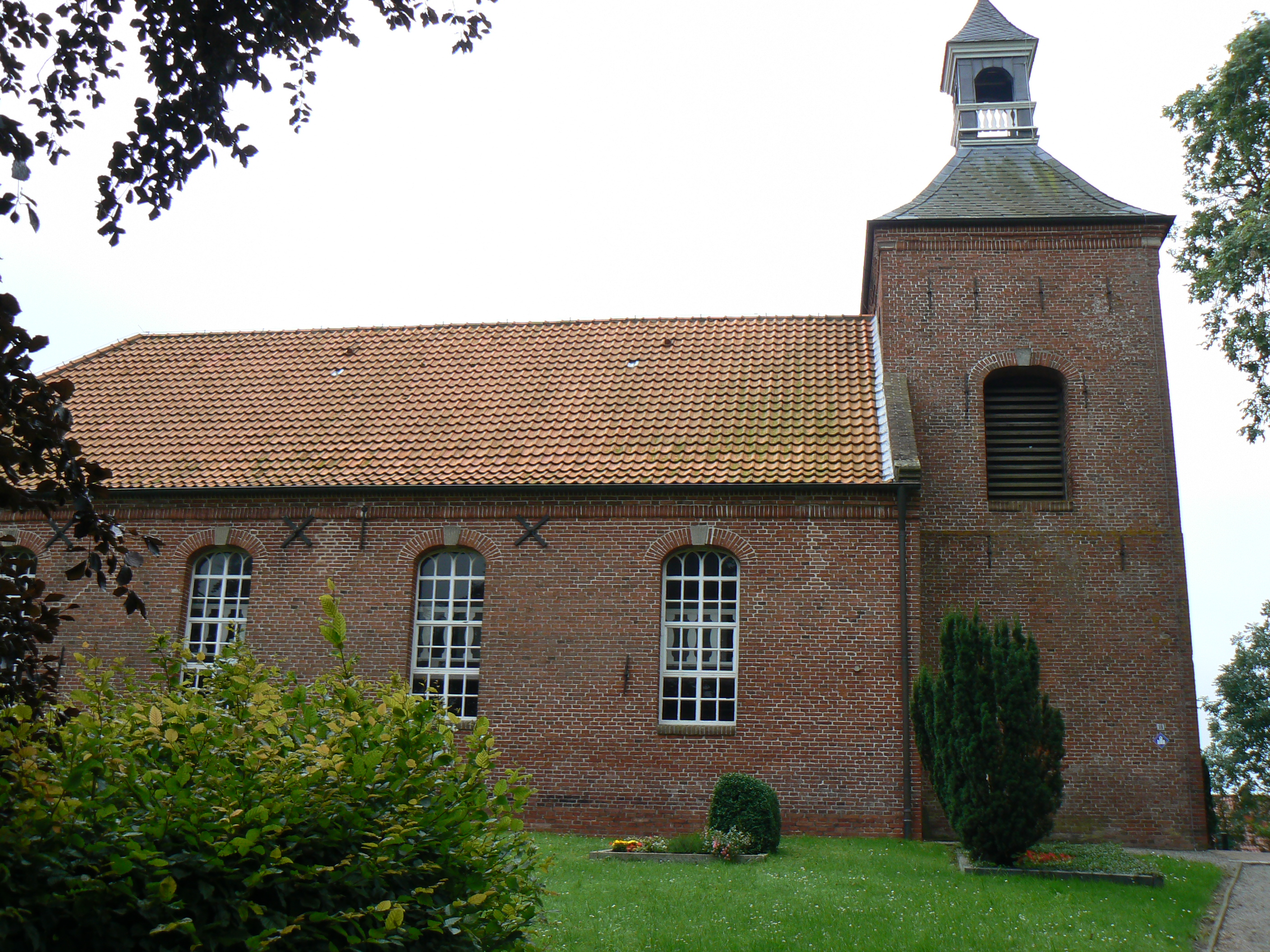 Church Berdum, Wittmund/Germany